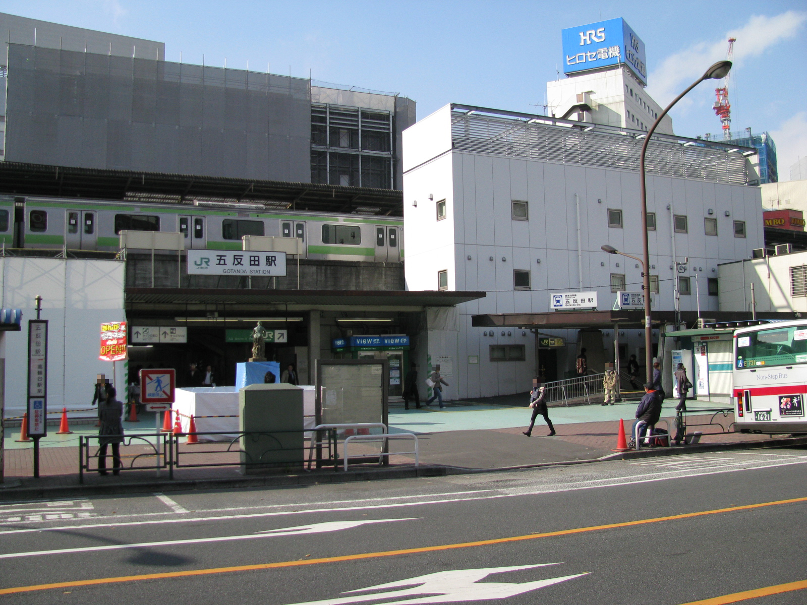 JR、都営地下鉄五反田駅駅舎